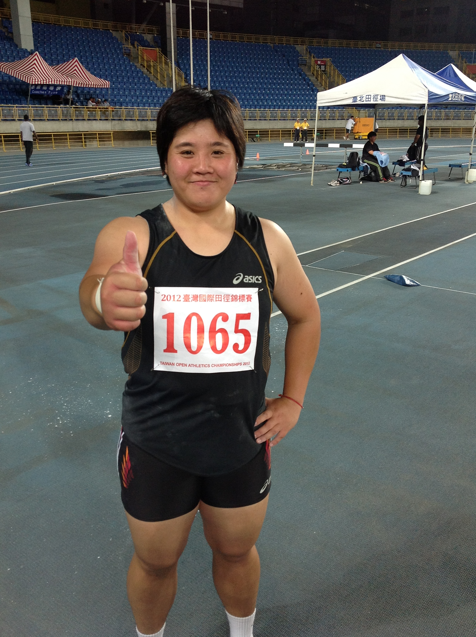 臺灣女子鉛球運動員林家瑩於2012臺灣國際田徑錦標賽擲出17.38公尺獲2012倫敦奧運參賽權，於臺北田徑場留影。